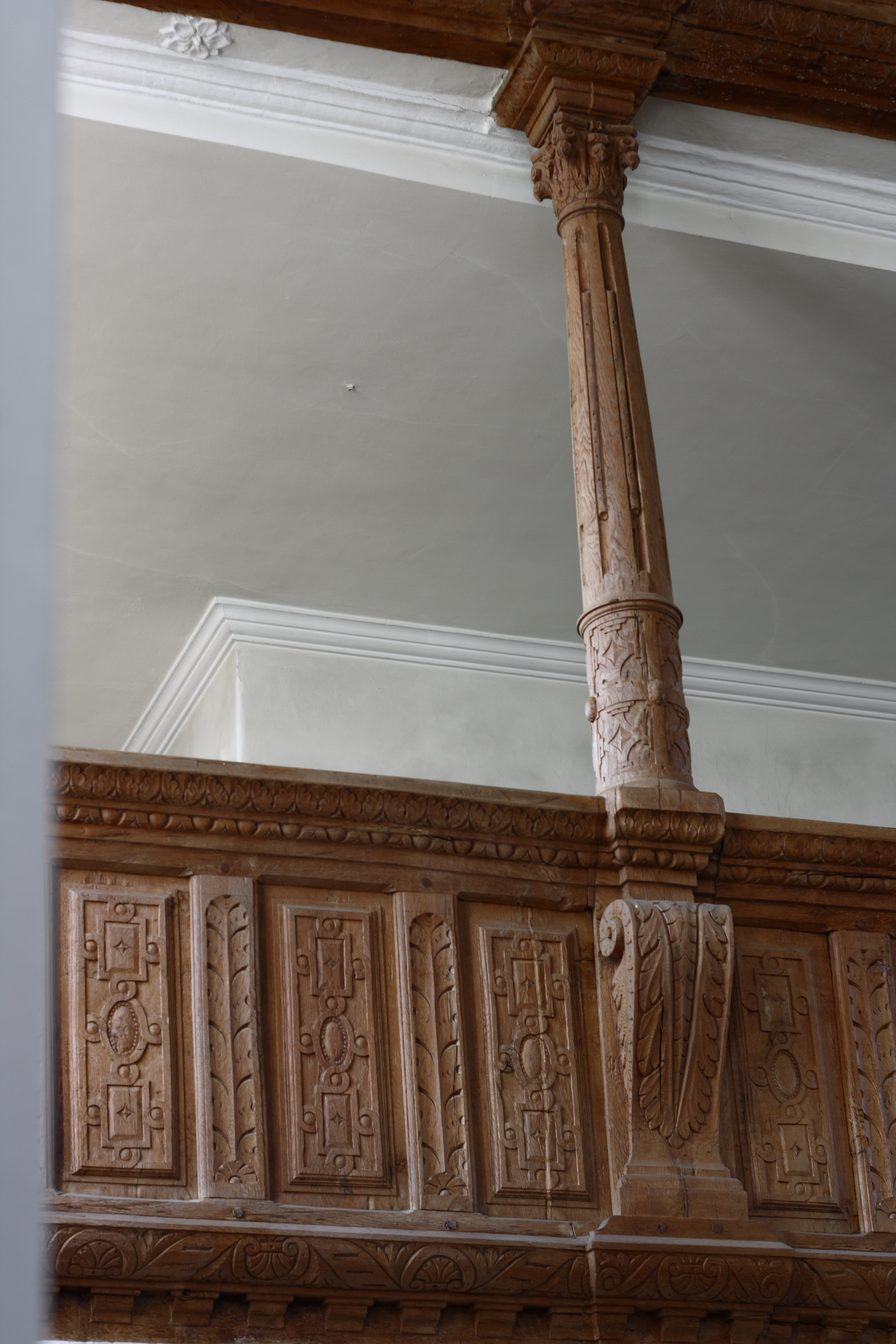 Evangelisch-lutherische Dreifaltigkeitskirche in Haunsheim, einer Gemeinde im Landkreis Dillingen an der Donau (Bayern), Orgelempore, Säule und Brüstung aus Eichenholz mit Flachschnitzerei